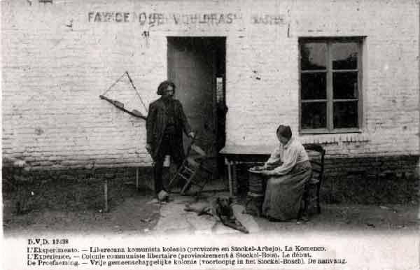 La colonie communiste libertaire "L'Expérience" est la section bruxelloise du Groupement Communiste Libertaire fondé le 25 juillet 1905 en vue de structurer le mouvement anarchiste afin de mener une action commune et une propagande soutenue.